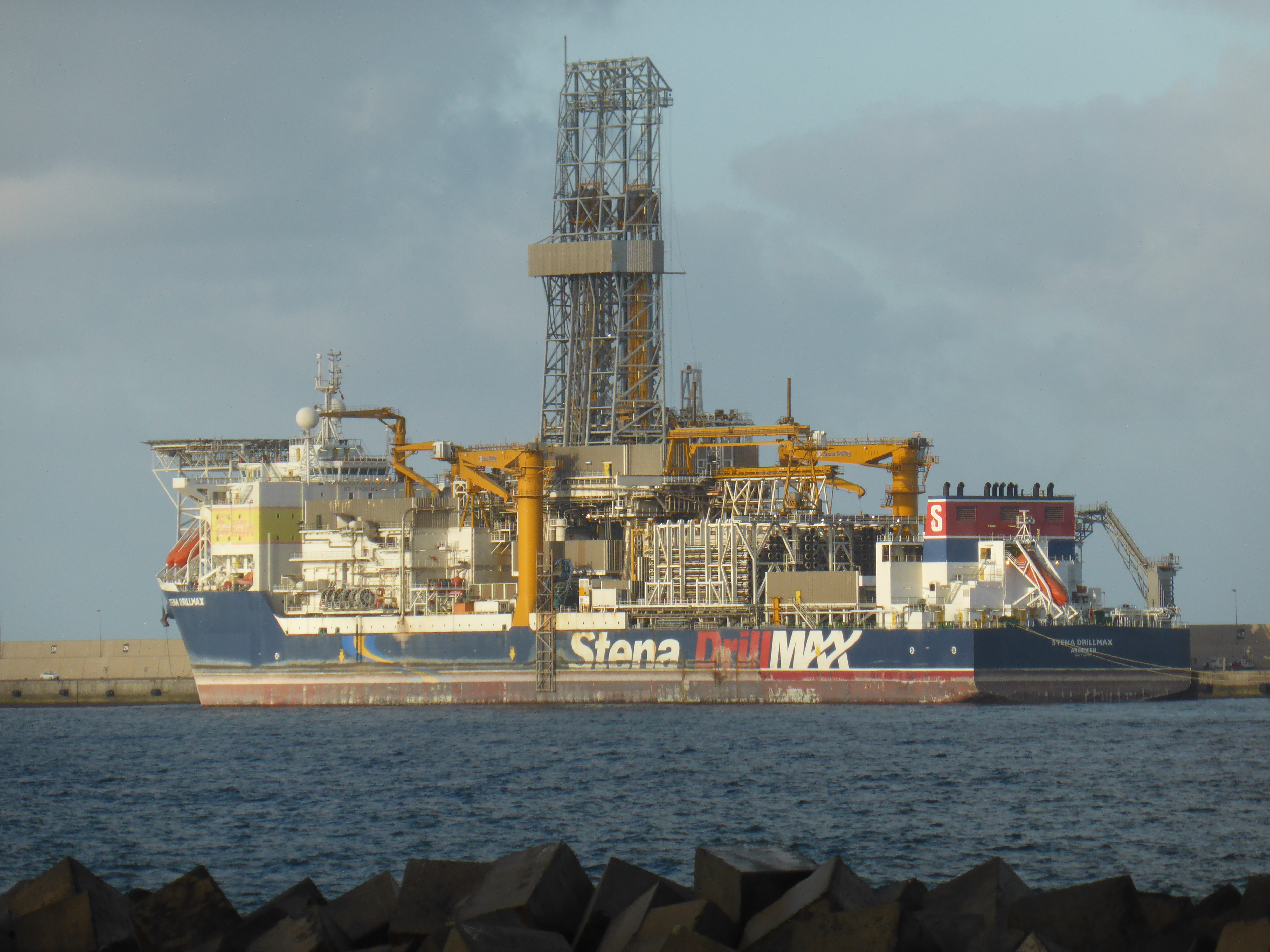 En 2016, en el Puerto de la Luz y de Las Palmas, se encuentran diferentes plataformas perforadoras petrolíferas, a la espera de una reactivación económica. En este caso se trata del moderno buque "Stena Drillmax", matriculado en Aberdeen (Reino Unido, U. K.), IMO 9364942, año de construcción 2007.